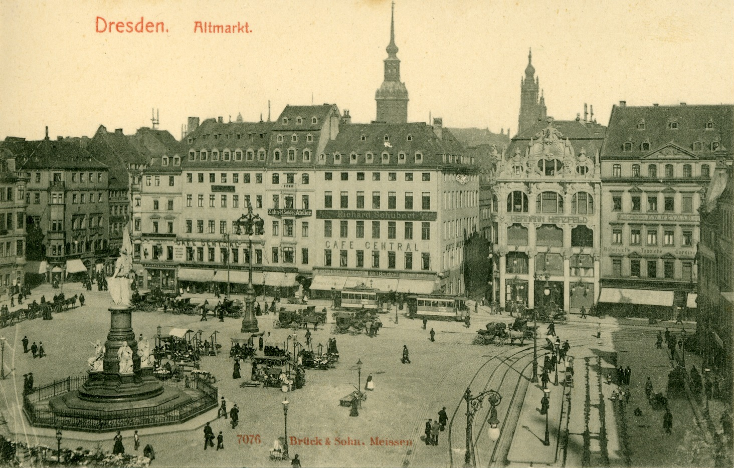 Dresden; Altmarkt This postcard is from publisher Brück & Sohn in Meißen ( postcard has a unique number 07076 and is available in a higher resolution at the publisher. This images was uploaded in a cooperation project between Wikipedians and the publisher.